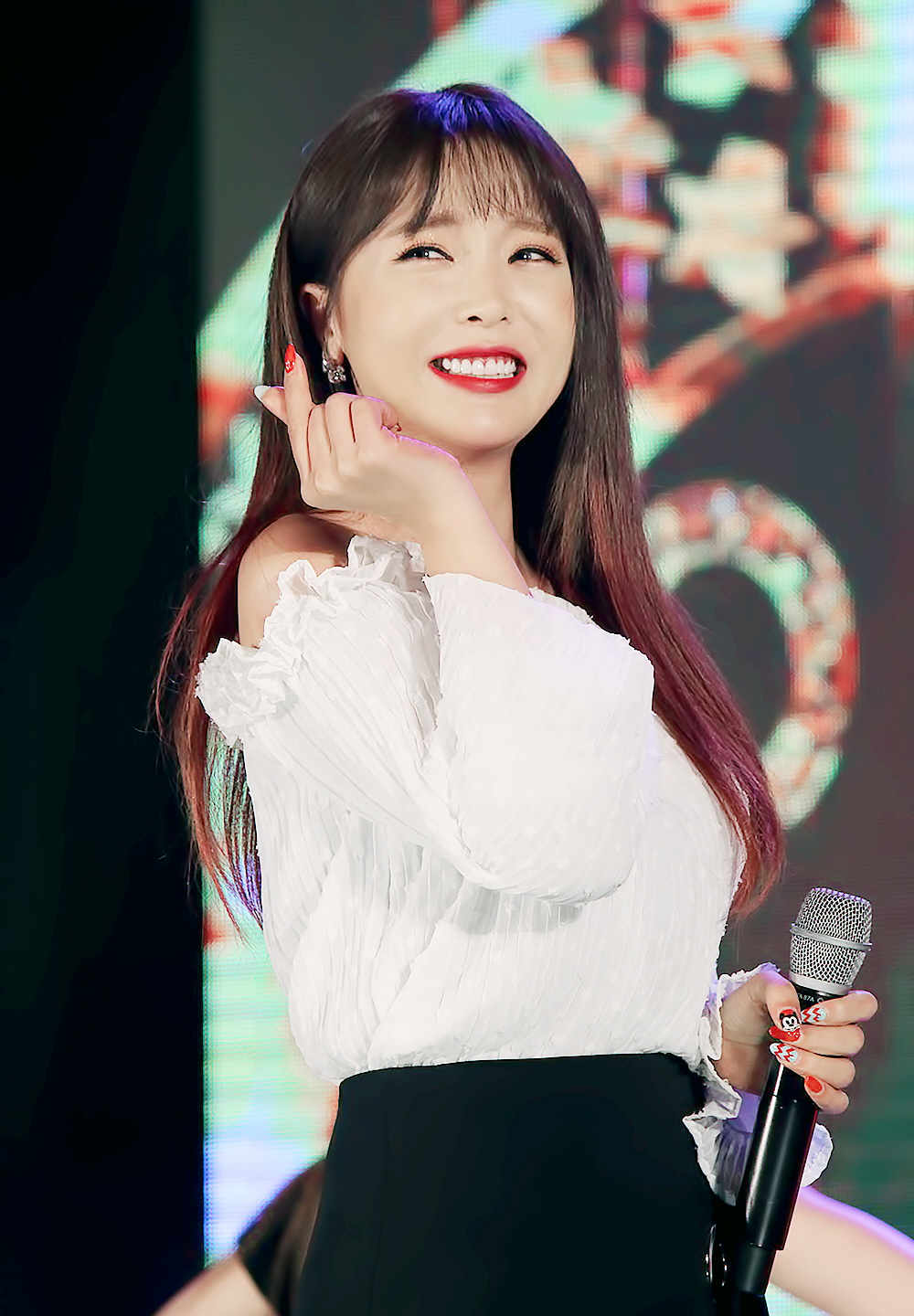 170526 안산 근로자 뮤직페스티벌 홍진영 직찍